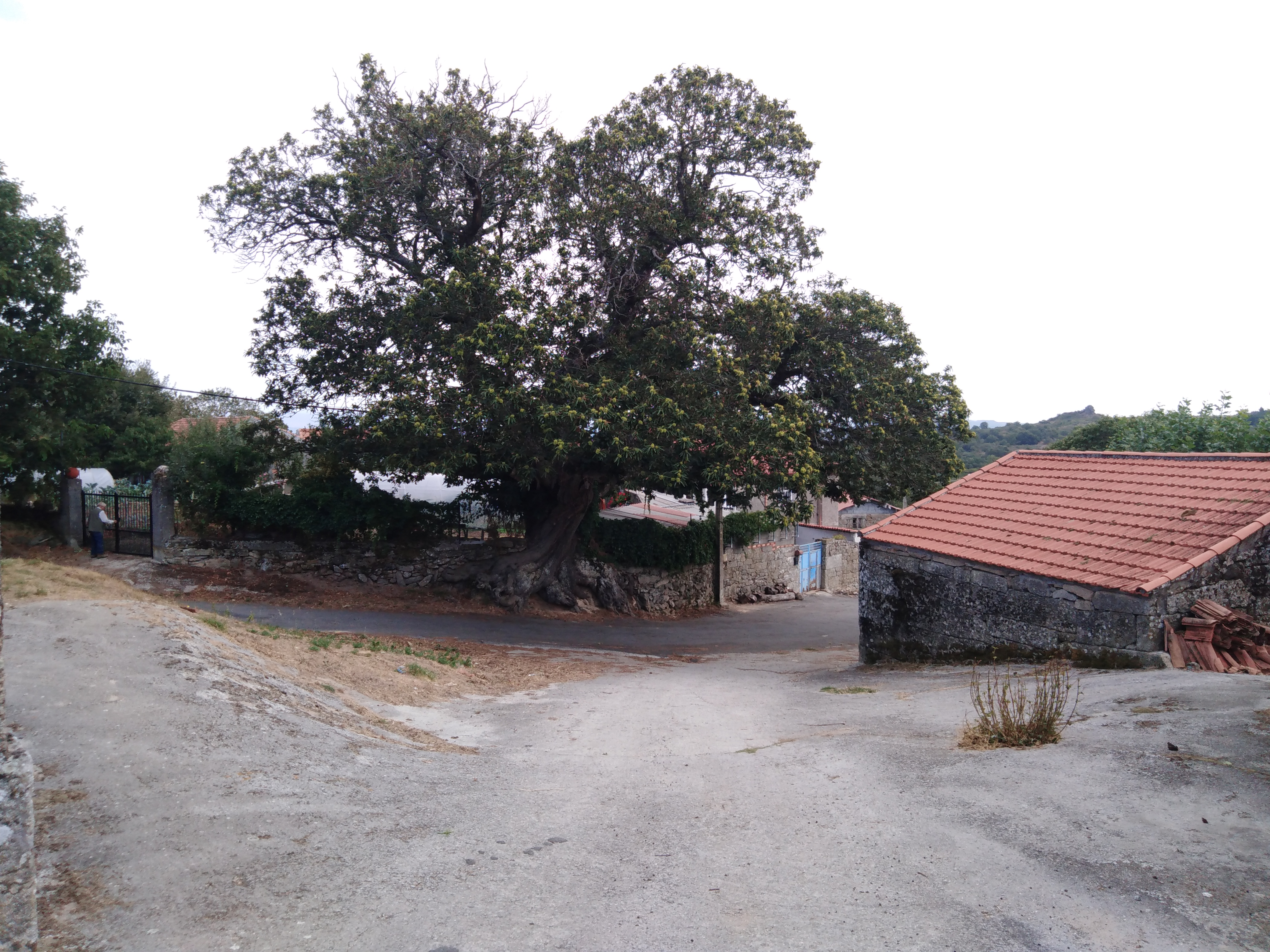 Castiñeiro en Pexeirós (Guntín, Os Blancos)